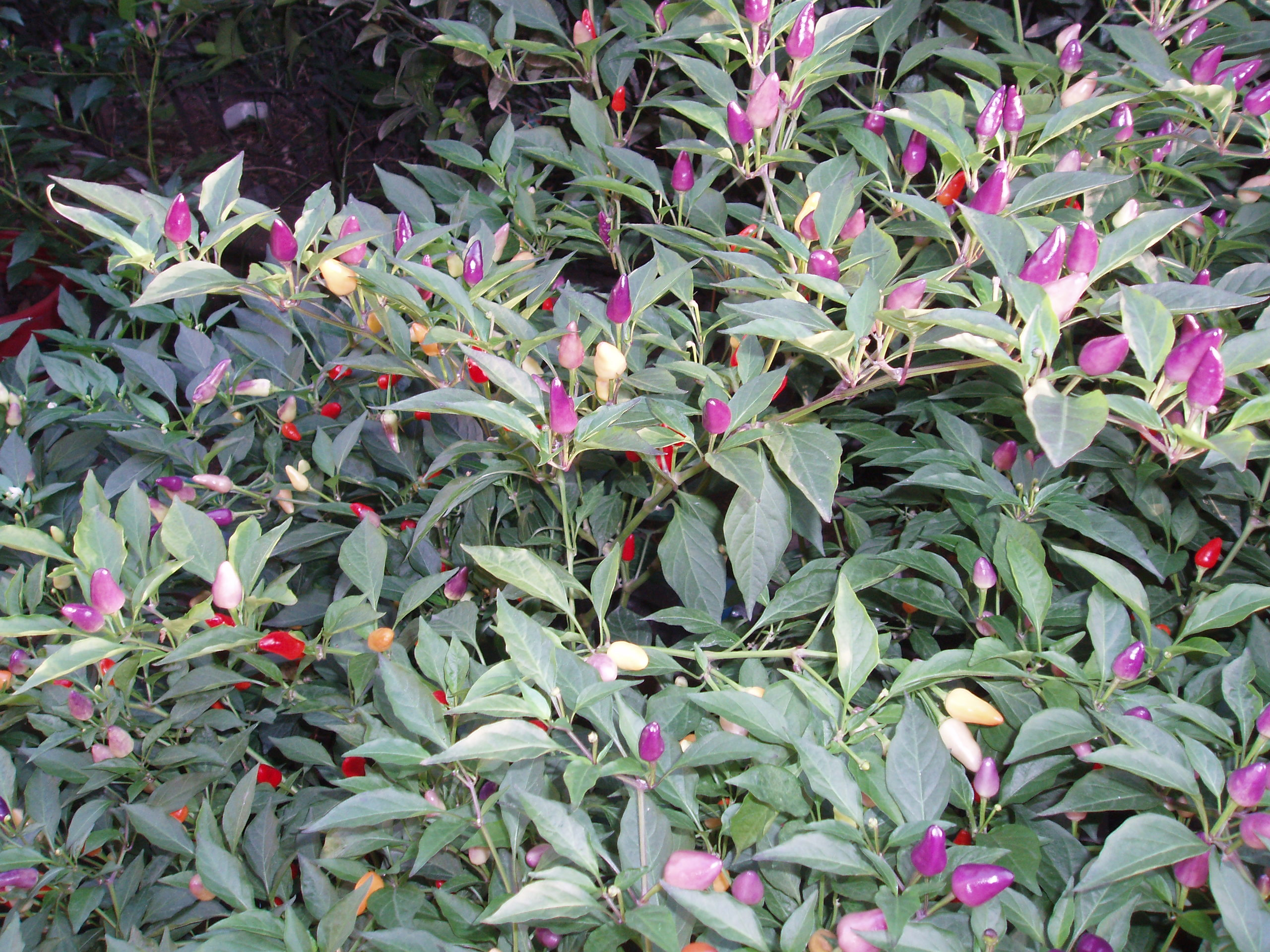 Cone pepper